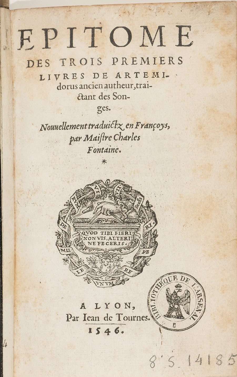 Page de garde des Epitomes d'Artémidore traduits par Charles Fontaine